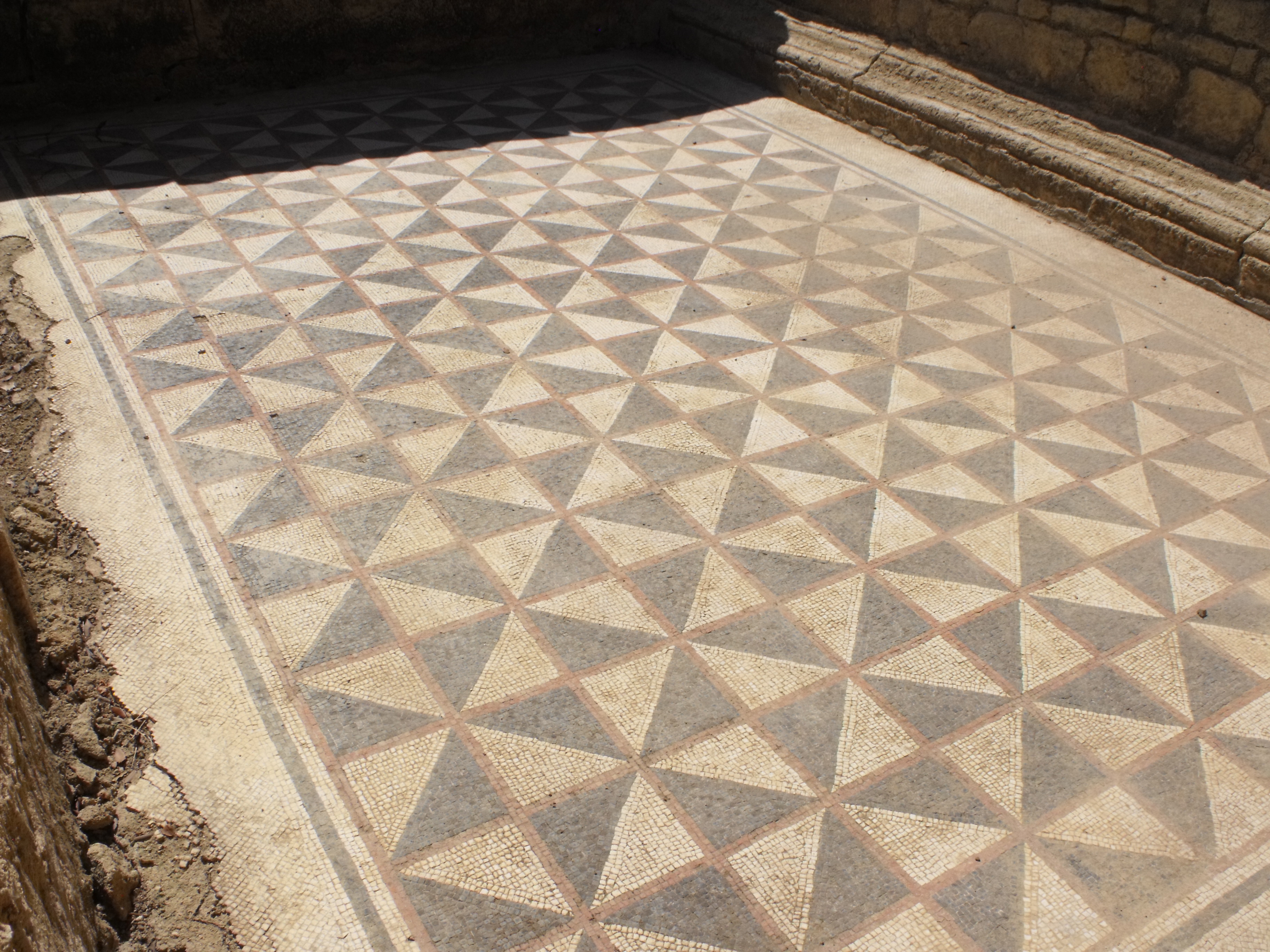 Mosaique, Fouilles de l'oppidum d'Altimurium, Murviel les Montpellier, Hérault, France